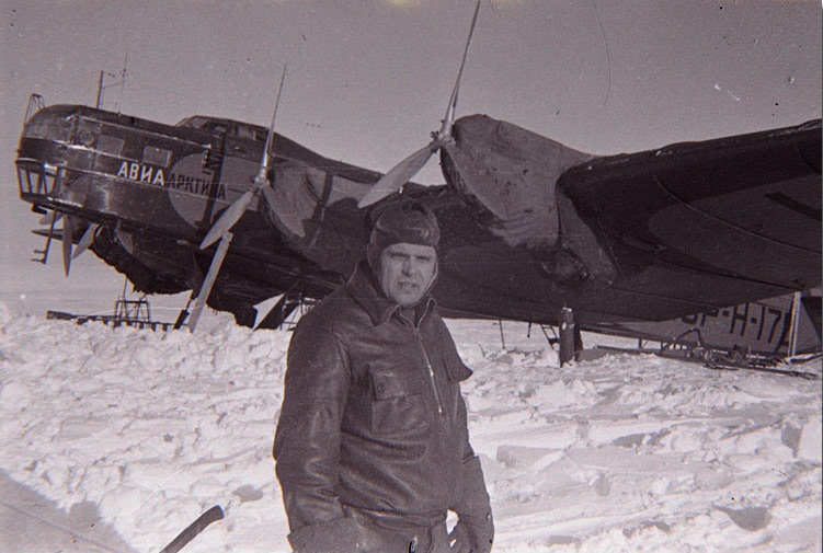 Полярный лётчик, Герой Советского Союза Михаил Васильевич Водопьянов. Довоенное фото